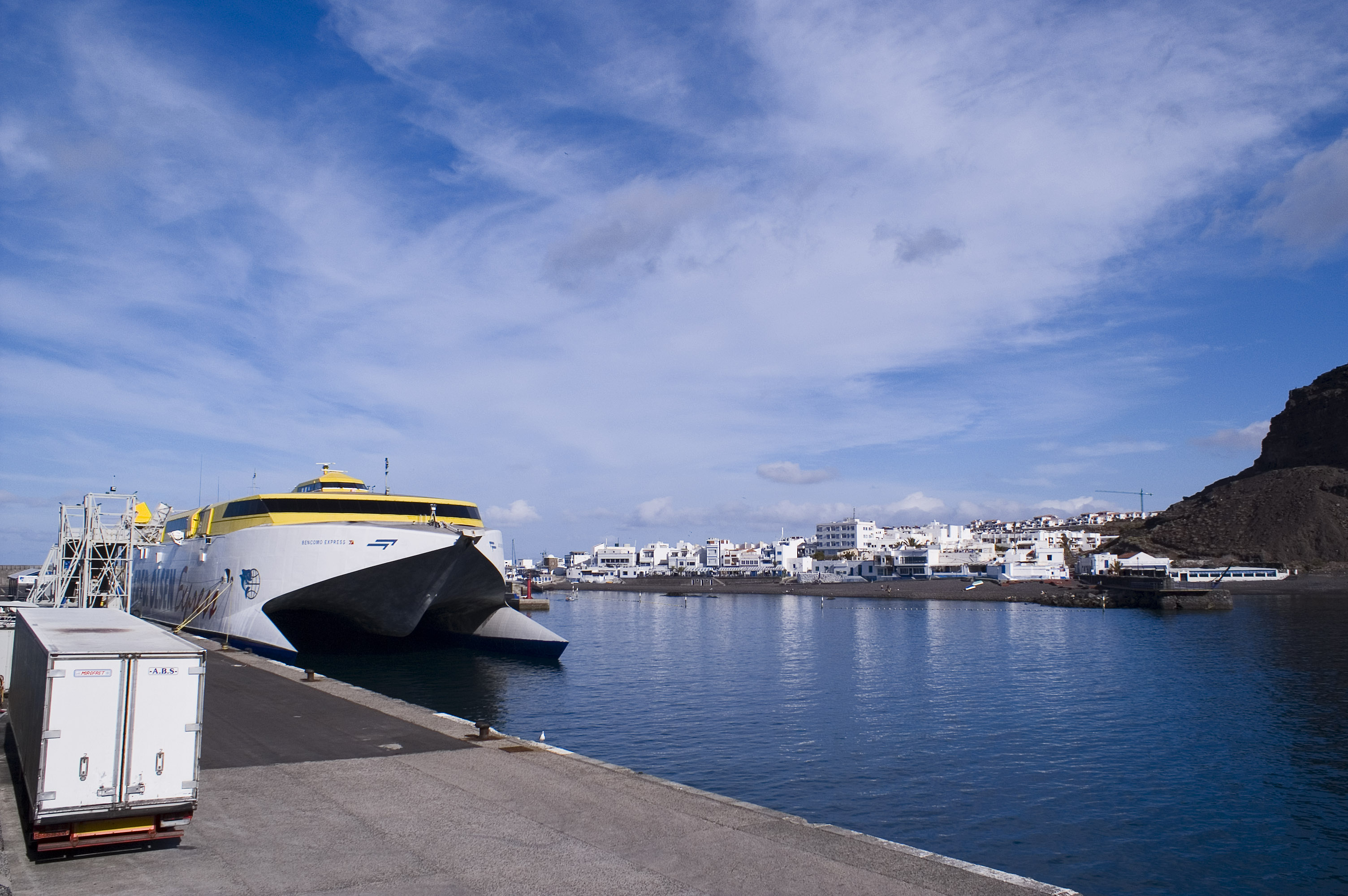 Bildbeschreibung: Puerto de las Nieves, Agaete (Gran Canaria) // Fast Ferry Bencomo Express de la compañía Fred. Olsen Express que cubre la línea Gran Canaria-Tenerife. Quelle: selbst fotografiert Fotograf/Zeichner: Guido Haeger (eMail: wikipedia [ a t ] haeger [ d o t ] de) Datum: Dezember 2005